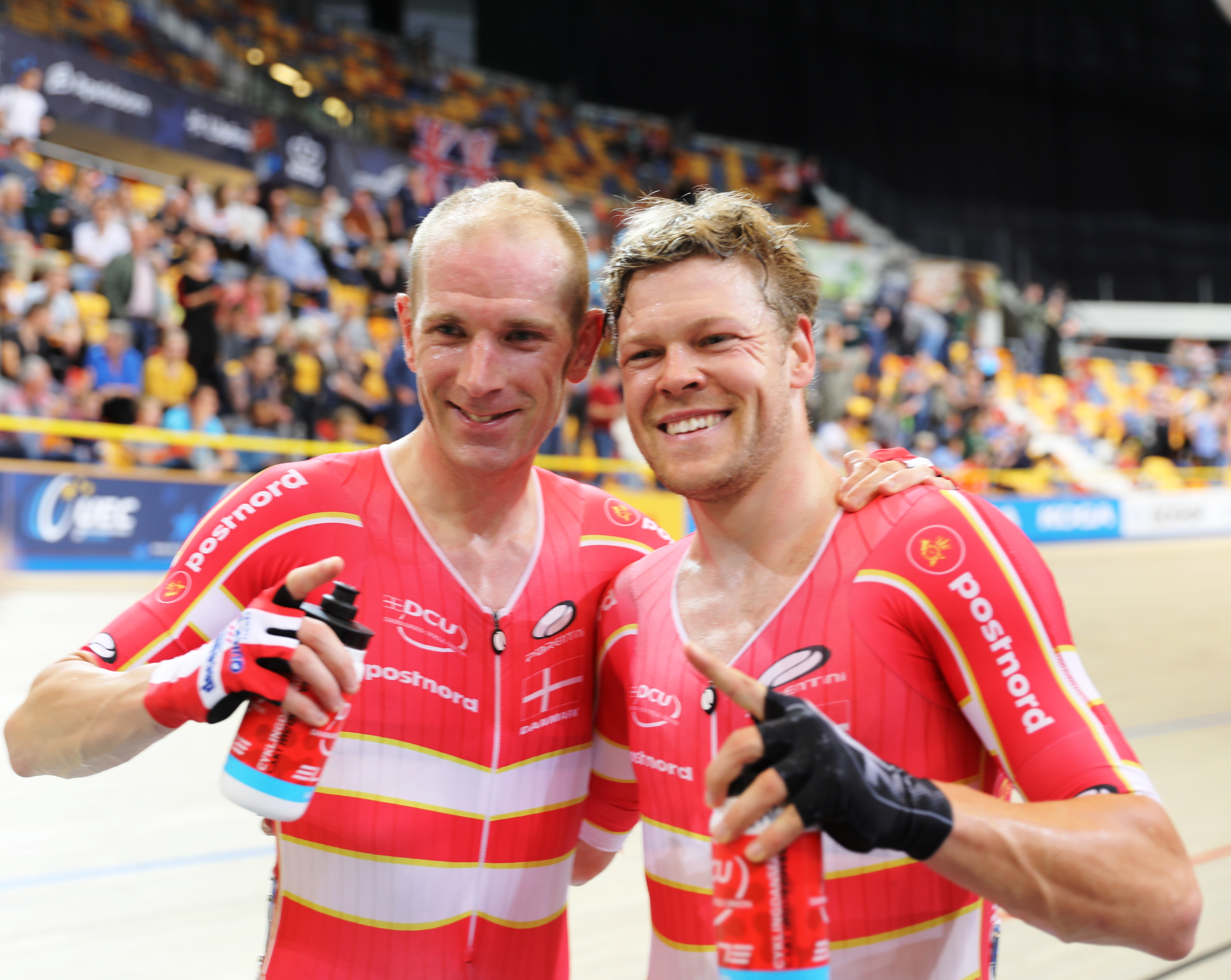 Michael Mørkøv (l.) und Lasse Norman Hansen, nach ihrem EM-Sieg 2019 im Zweier-Mannschaftsfahren